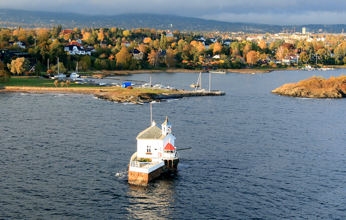 Dyna fyr, Indre Oslofjord. I bakgrunnen en del av Bygdøy.